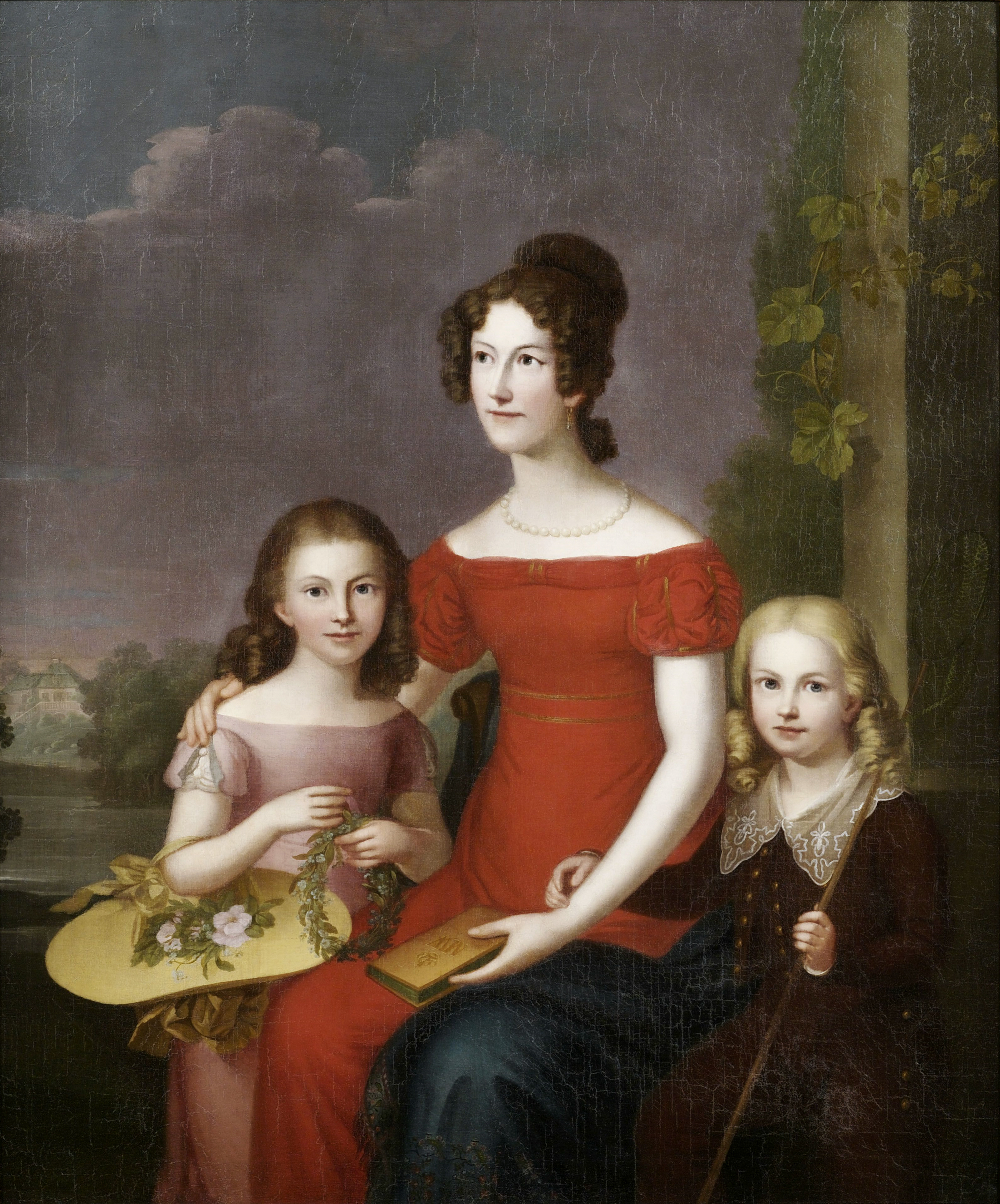 Caroline Friederike Mathilde, Herzogin von Württemberg (geborene Prinzessin von Waldeck-Pyrmont, 1801-1825), Ehefrau des Eugen von Württemberg (1788–1857); mit ihren zwei Kindern Marie und Eugen Wilhelm; an einer Balustrade vor Landschaftshintergrund. Öl auf Leinwand, unten rechts signiert und undeutlich datiert. 134,5 x 112 cm Princess Mathilde of Waldeck and Pyrmont (1801–1825) Duchess Marie of Württemberg (25 March 1818 – 10 April 1888) Duke Eugen of Württemberg (1820–1875)